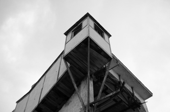 Garitta base operativa Monte Telegrafo